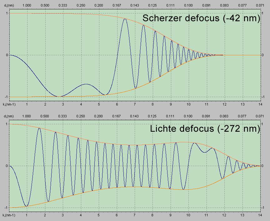 Graph der CTF eines Philips CM300. (oben) bei Scherzer Defokus mit der grösstmöglichen Punkt Auflösung (1.7 Å) (unten) bei Lichte Defokus, bei dem das Informationslimit maximiert ist (0.8 Å) Die CTF wird durch örtliche und zeitliche Inkoherenz gedämpft.